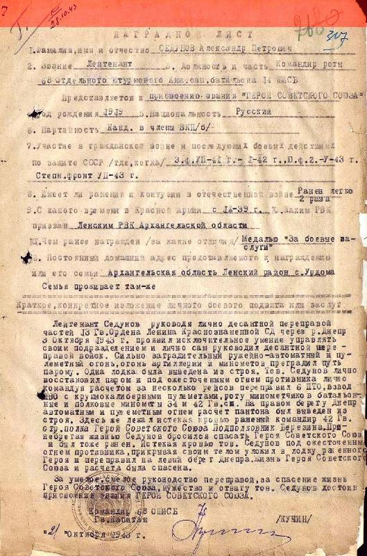 Наградной лист